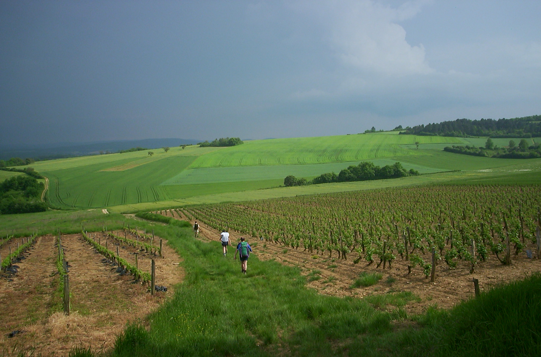 Landscape, Morvan, France